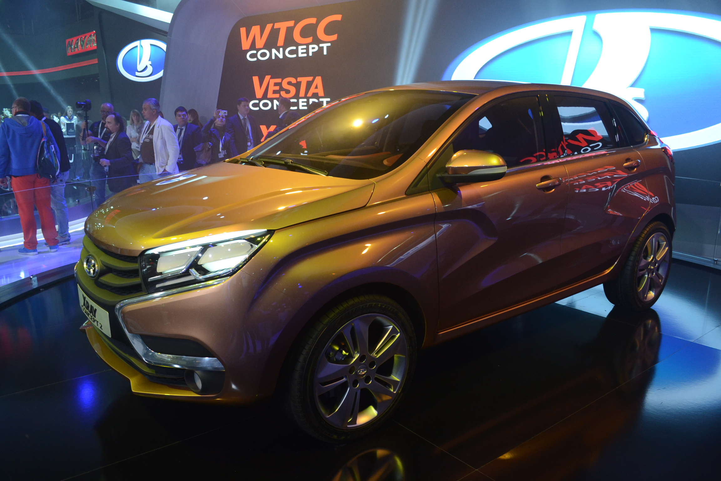 Концепт-кар Lada XRAY на Московском автосалоне 2014